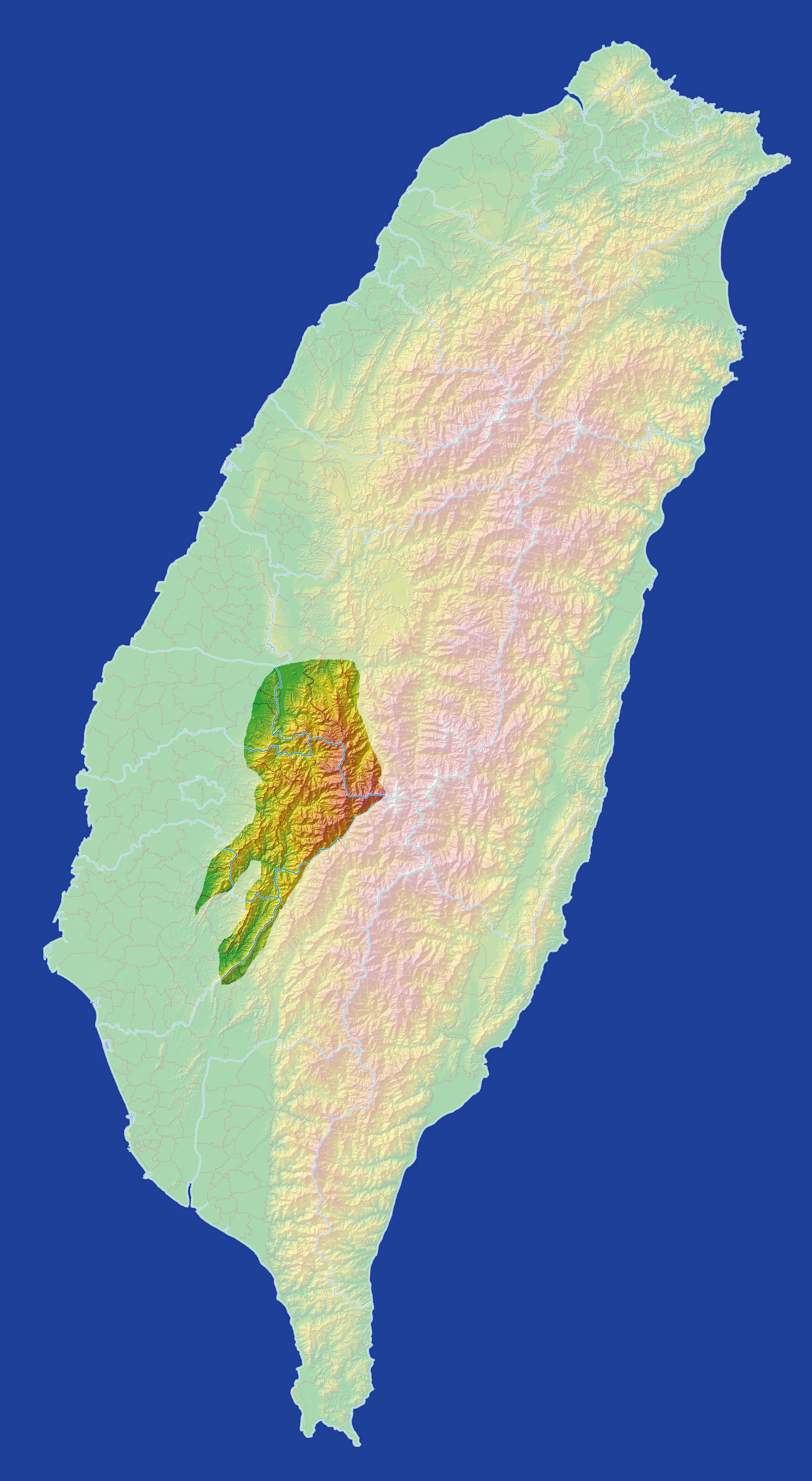 Map of Alishan Range, Taiwan